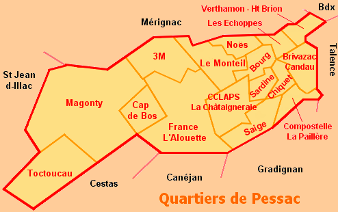 Carte des quartiers de la ville de Pessac (France, Gironde)